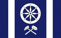 List tvoří pět svislých pruhů: modrý, bílý, modrý, bílý a modrý v poměru 1:1:5:1:1. Ve středu modrého pole bílé kolo s osmi rameny a pod ním zkřížená bílá hornická kladívka. Poměr šířky k délce listu je 2:3.